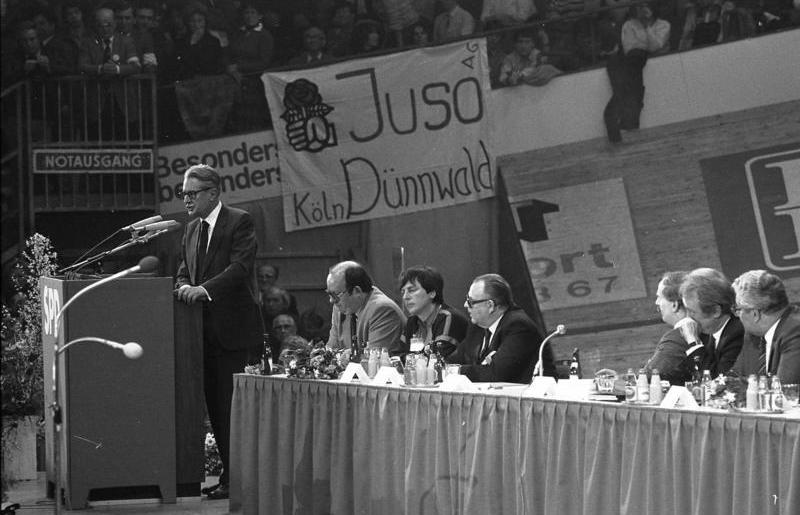 28.2.1983 SPD-Wahlkundgebung mit Kanzler-Kandidat Dr. Hans-Jochen Vogel in der Kölner Sporthalle